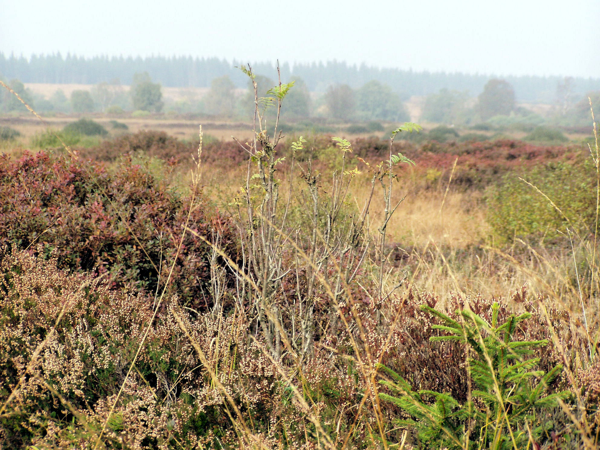 Naturschutzgebiet „Vennhochfläche bei Mützenich“ (NSG ACK-045), Herbst im Hohen Venn bei Mützenich.